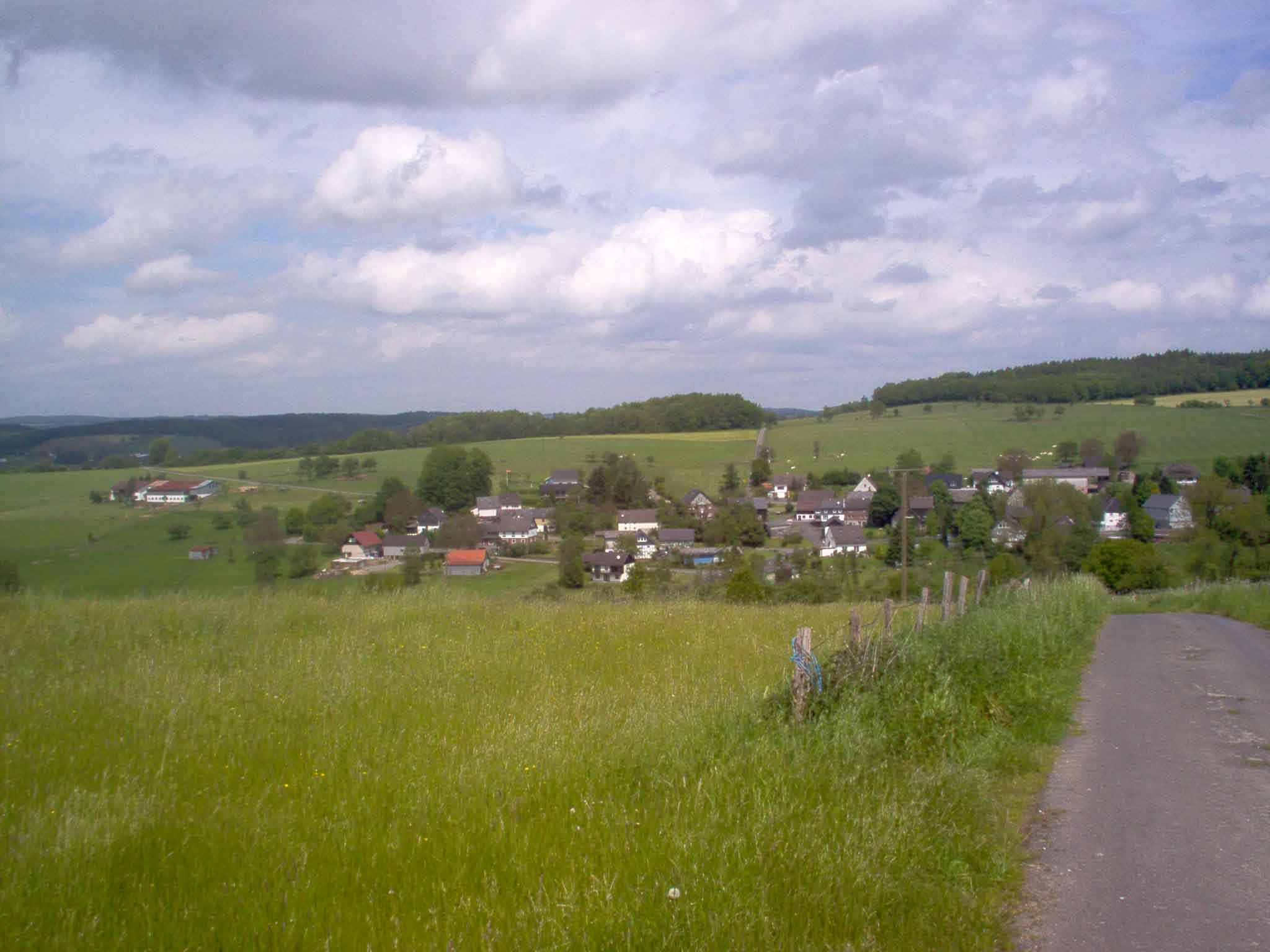 Niederbreidenbach 2004 vom Stranzenbacher Berg aus gesehen FOTO: Frank Braun Niederbreidenbach 27 B 51588 Nümbrecht